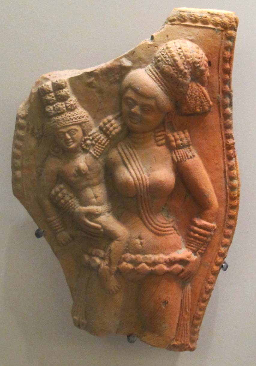 Chandraketugarth, epoca sunga, dea della fecondità, II-I sec. ac.